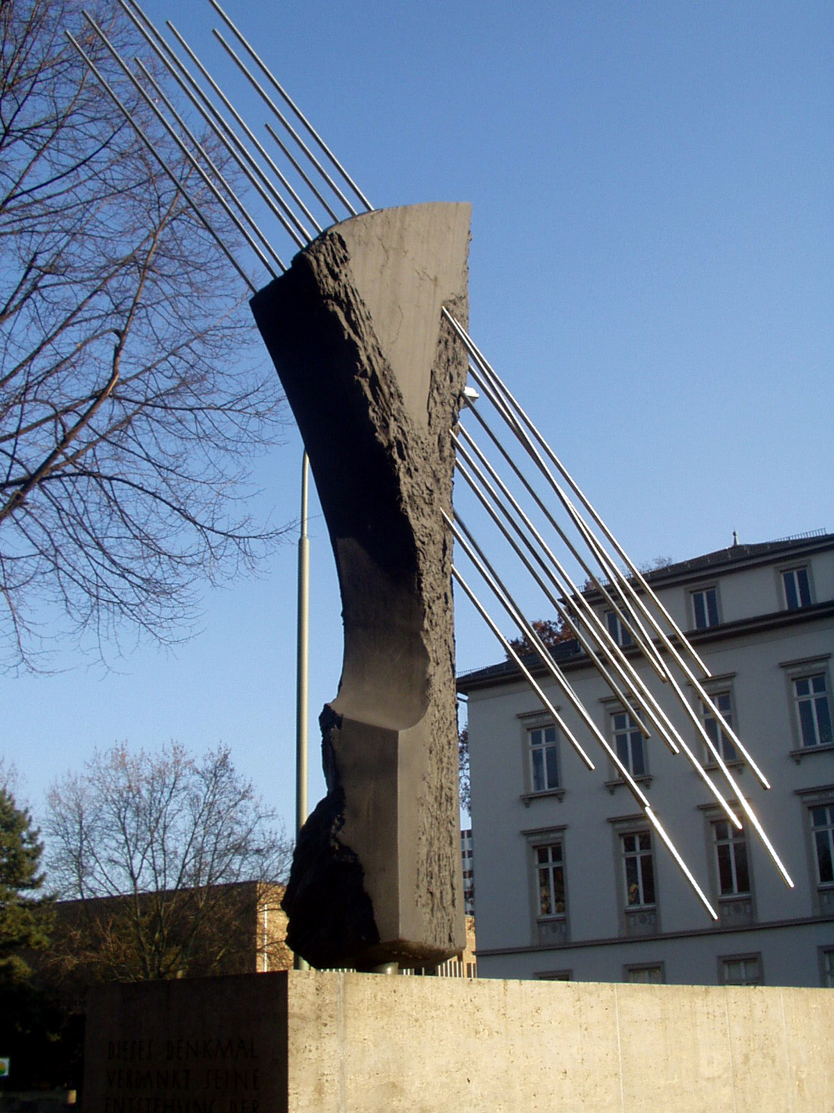 sculpture Röntgendenkmal in Giessen/Germany